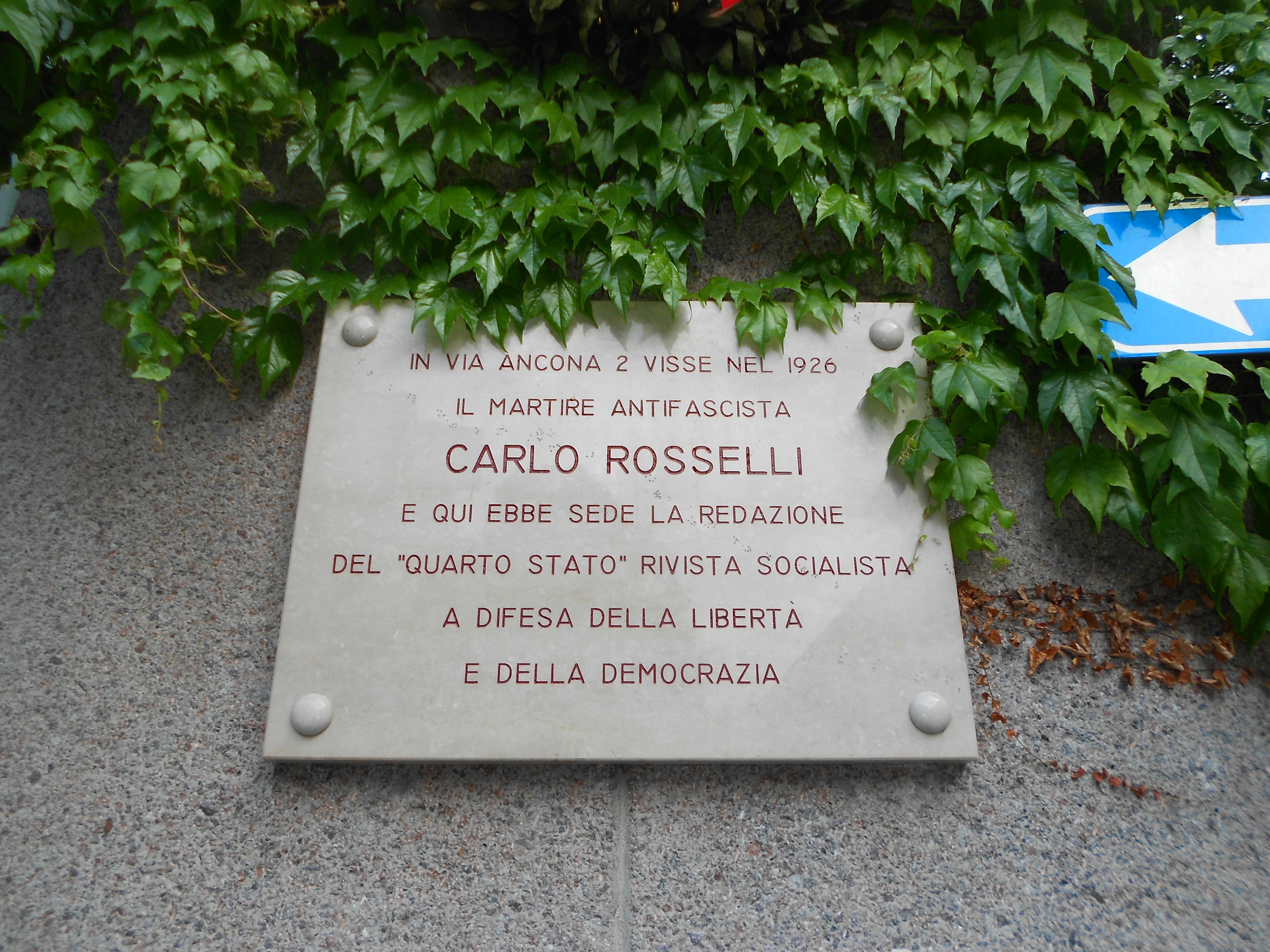 Lapide commemorativa dedicata a Carlo Rosselli sita a Milano in via Ancona 2